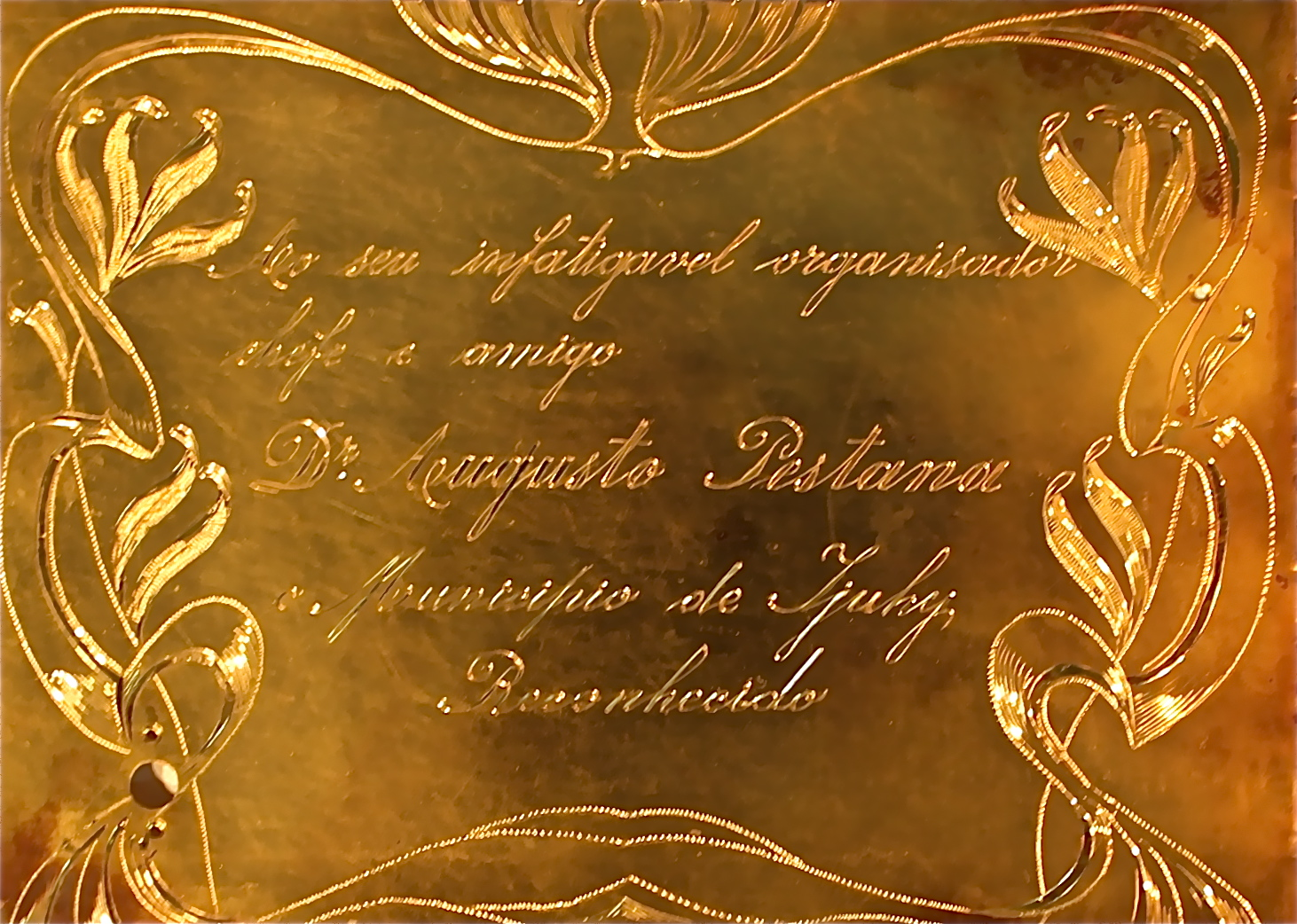 "Ao seu infatigável organizador, chefe e amigo, Dr. Augusto Pestana, o Município de Ijuí reconhecido".